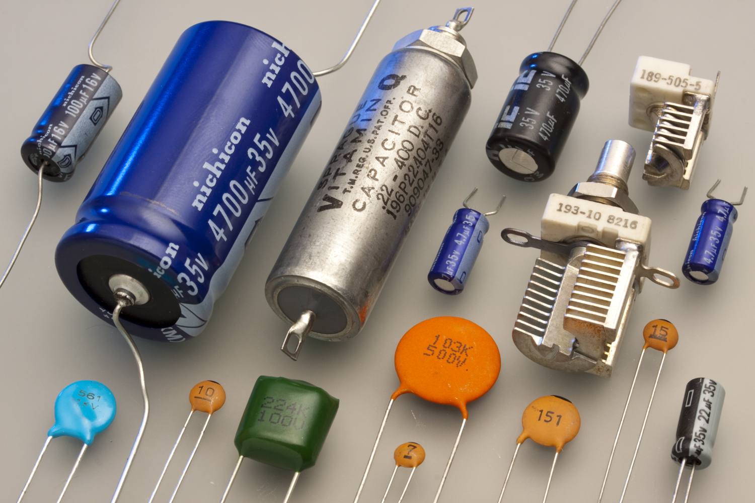 12739s